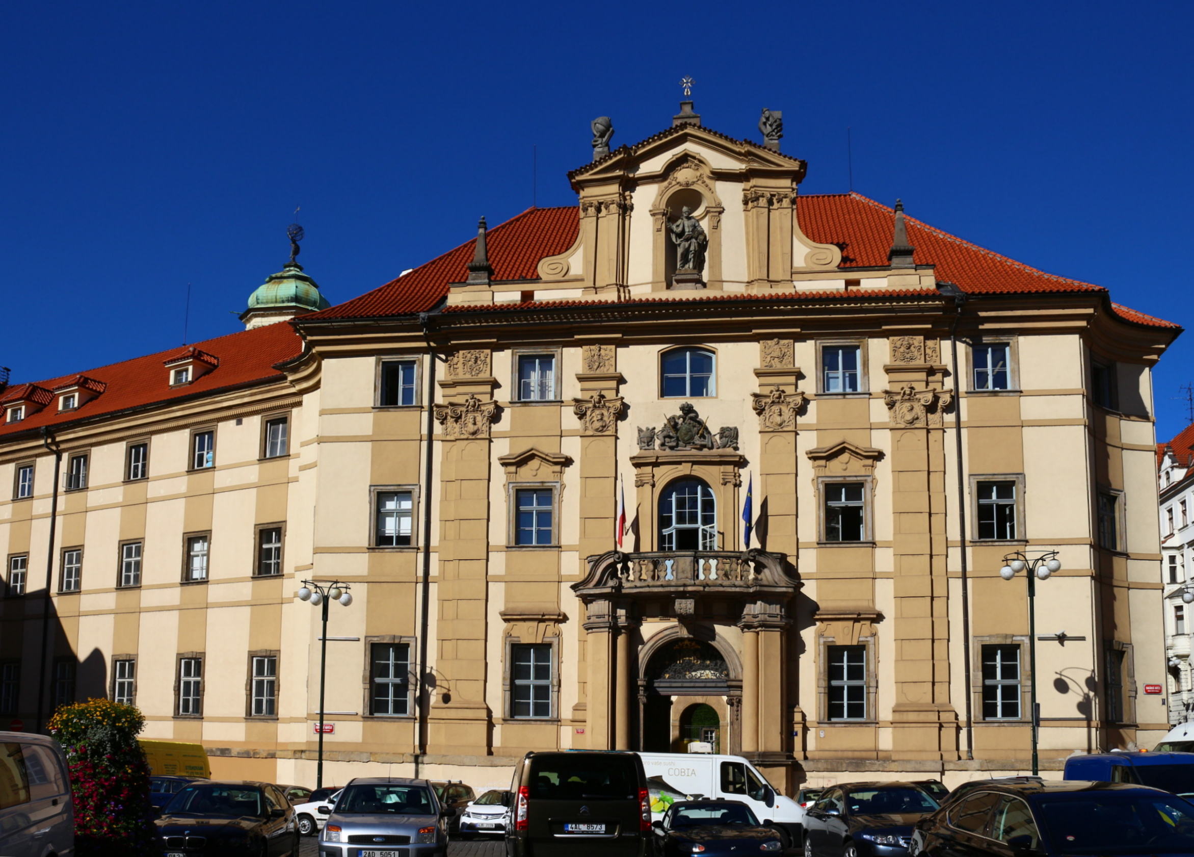 Klementinum